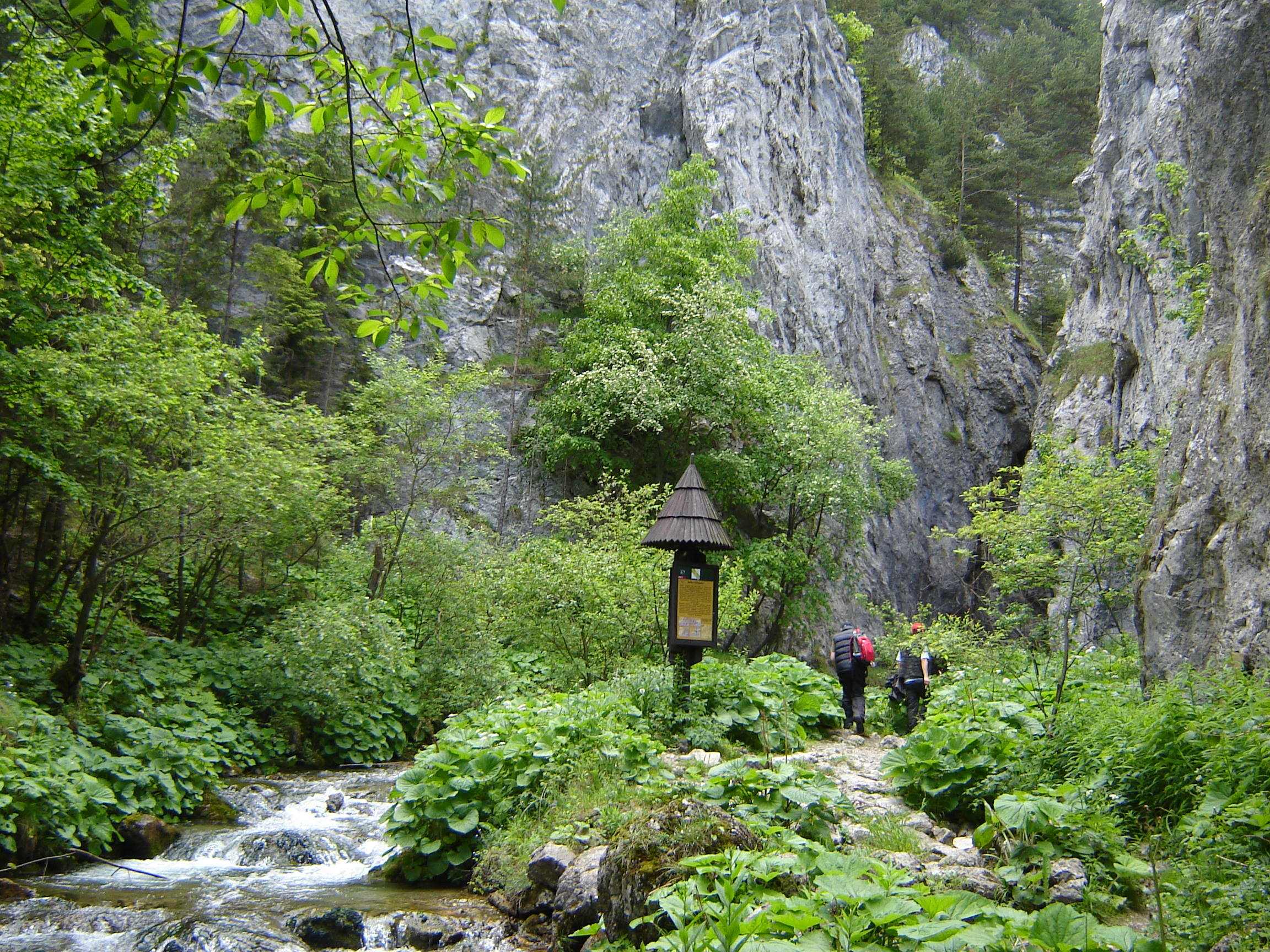 Tiesňava vrát